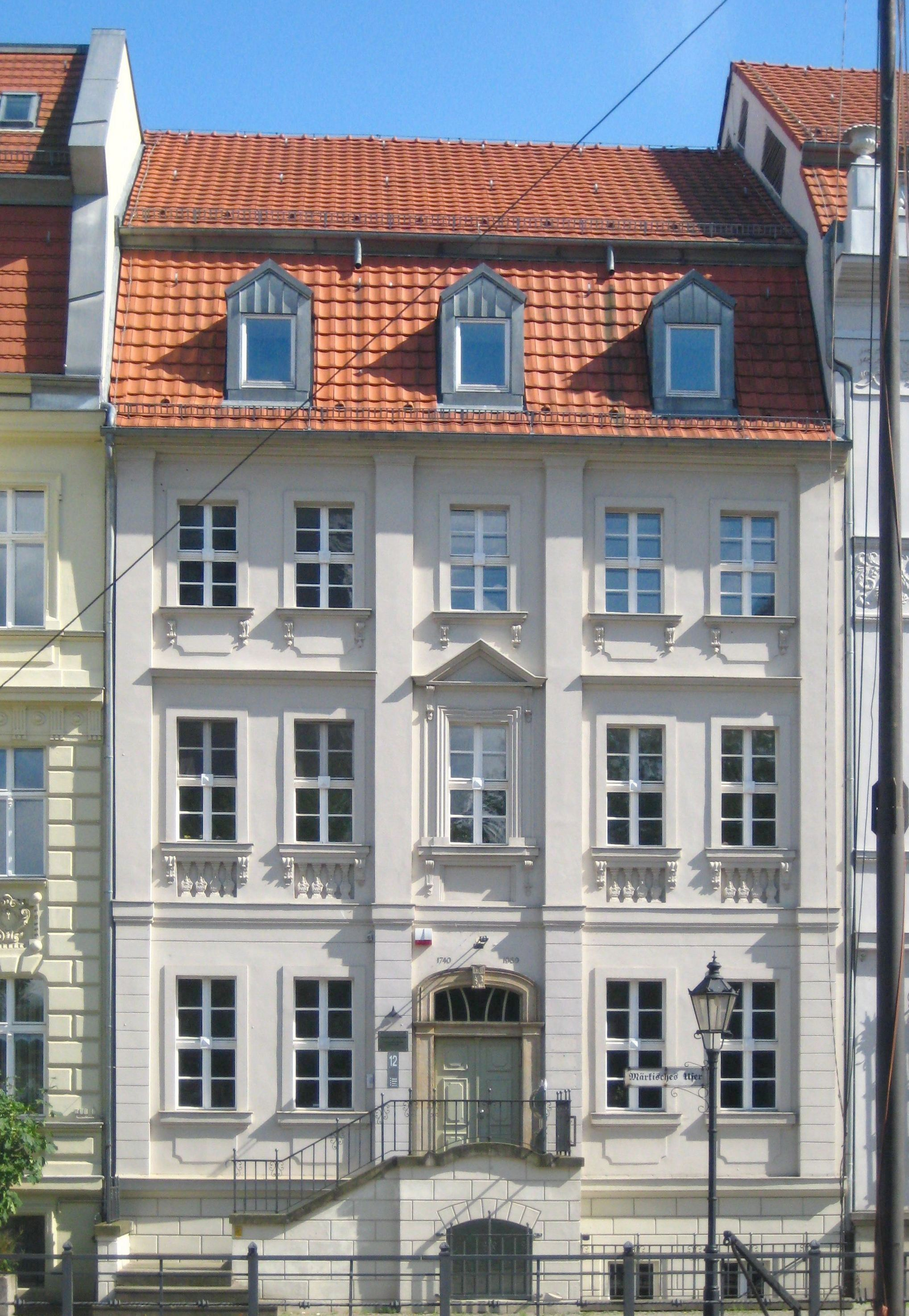 Bürgerhaus am Märkischen Ufer 12 in Berlin-Mitte. Das dreigeschossige Gebäude mit sockelartigem Untergeschoss wurde um 1740 auf der gegenüberliegenden Fischerinsel an der Friedrichsgracht 15 erbaut und 1969 an den neuen Standort versetzt, um eine Baulücke am Märkischen Ufer zu schließen und Platz für die Hochhausbebauung der Fischerinsel zu schaffen. Das Gebäude gehört zu den wenigen erhaltenen barocken Bürgerhäusern Berlins. Es ist im Innern mit dem rechts benachbarten Ermelerhaus (Hausnummer 10) verbunden und wird als Gaststätte benutzt. Das Gebäude ist als Teil des Bauwerksensembles Märkisches Ufer denkmalgeschützt.